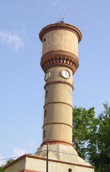 Torre del antiguo matadero de Badalona. Barrio de La Salut. Obra de Josep Fradera Botey. 1911-1929.